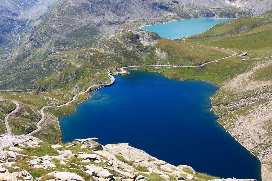 Il Lago Agnel (in primo piano) ed il Lago Serrù (sullo sfondo) in alta Valle Orco (TO)